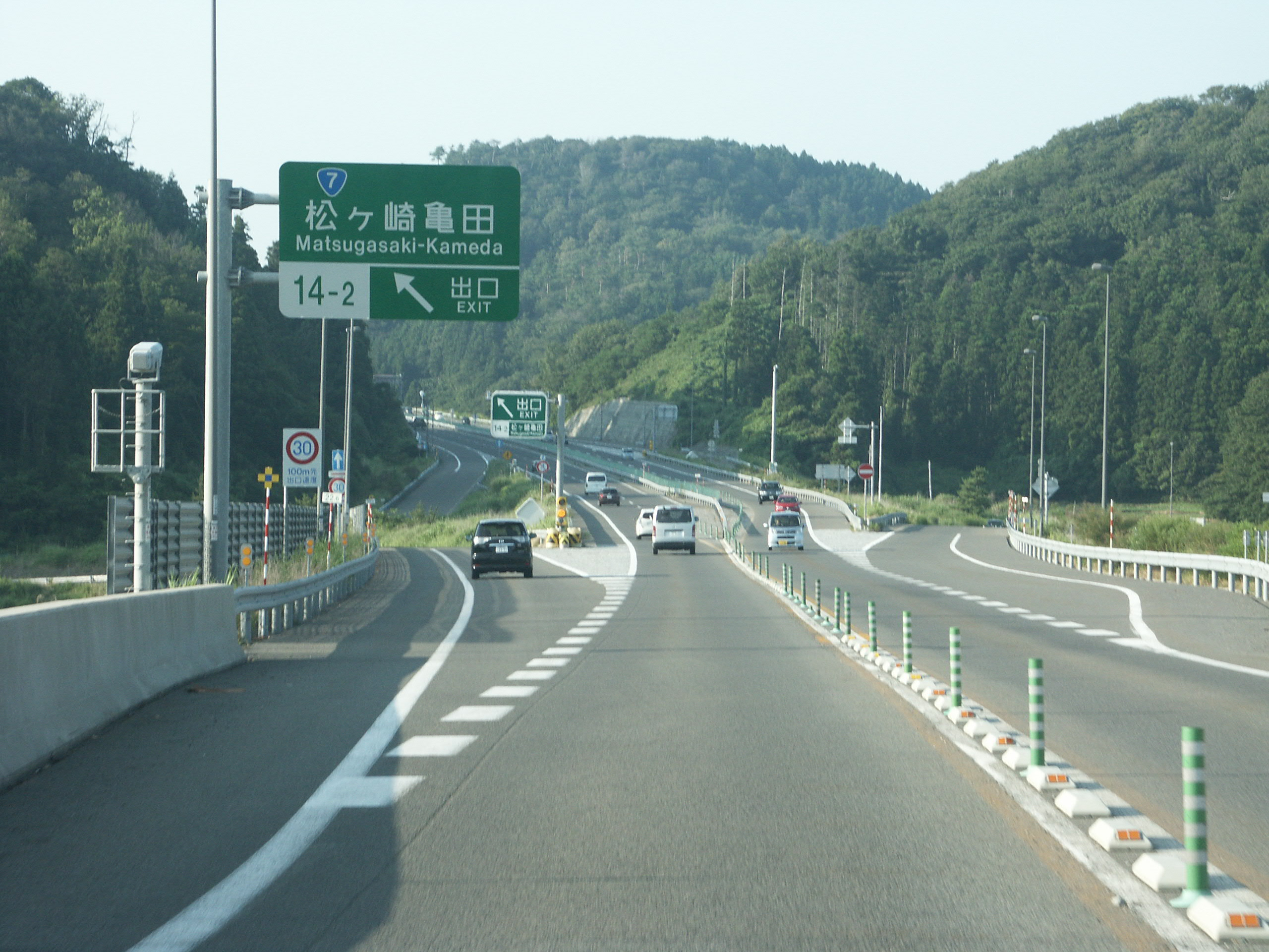 日本海沿岸東北自動車道 松ヶ崎亀田IC出口（大内JCT方面側）